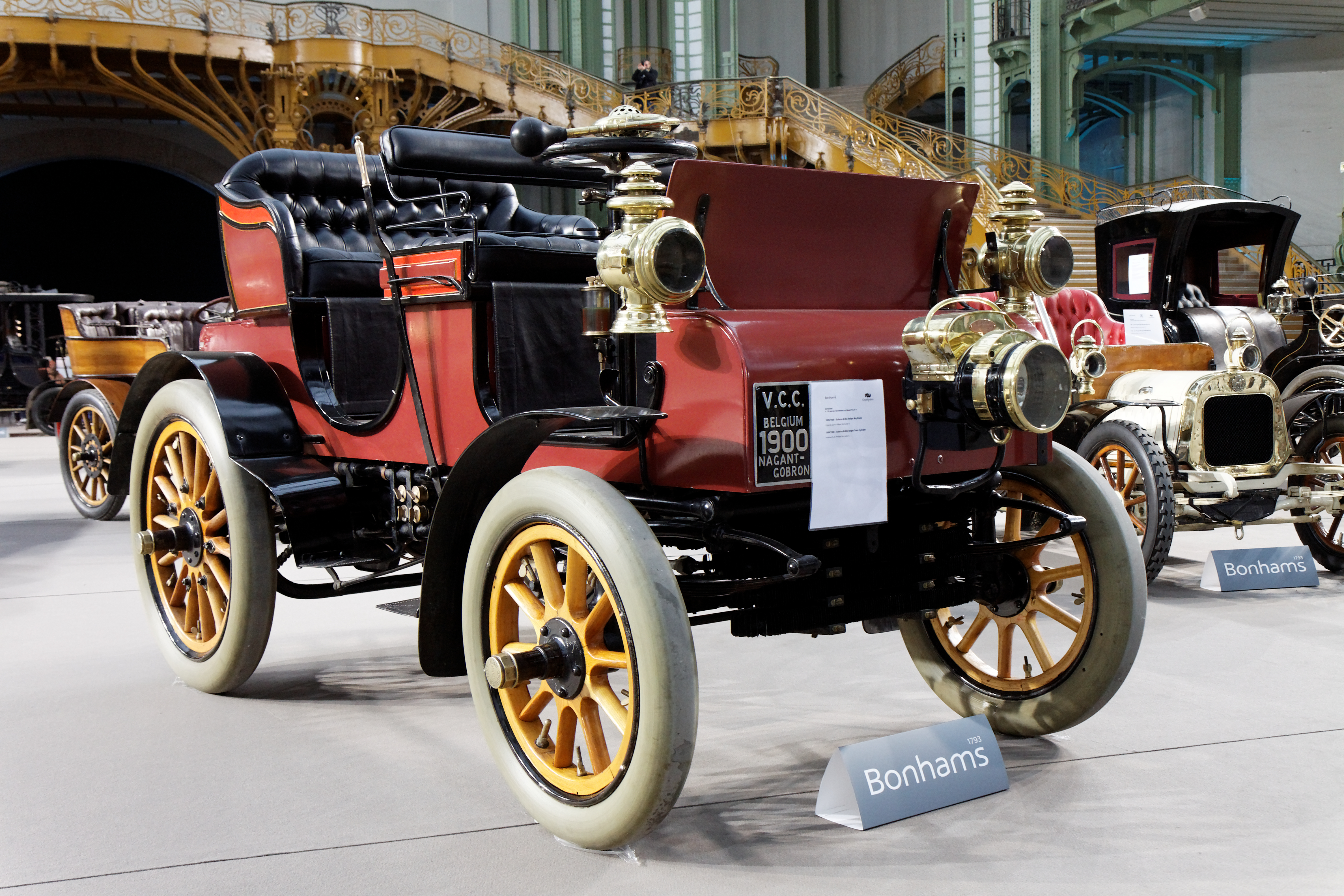 Gobron-Brillié Belges bicylindre